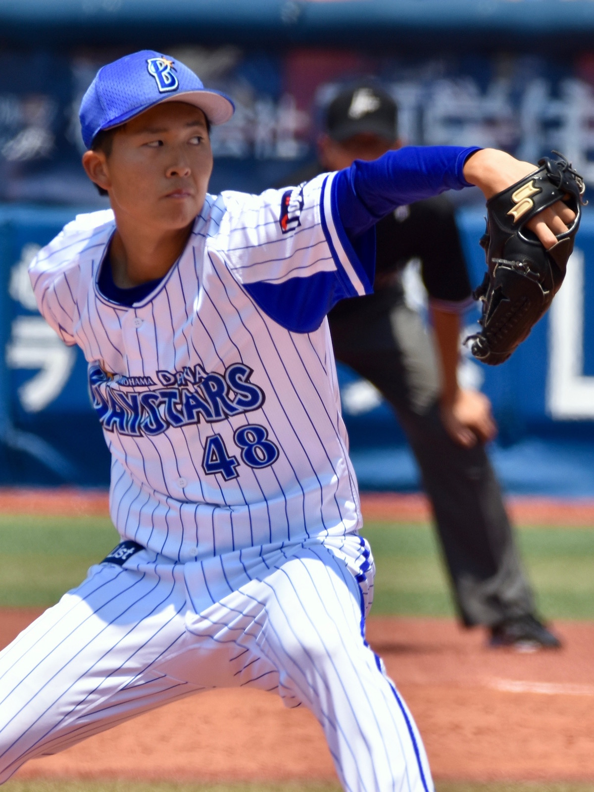 2017年6月16日、横浜スタジアムにて撮影